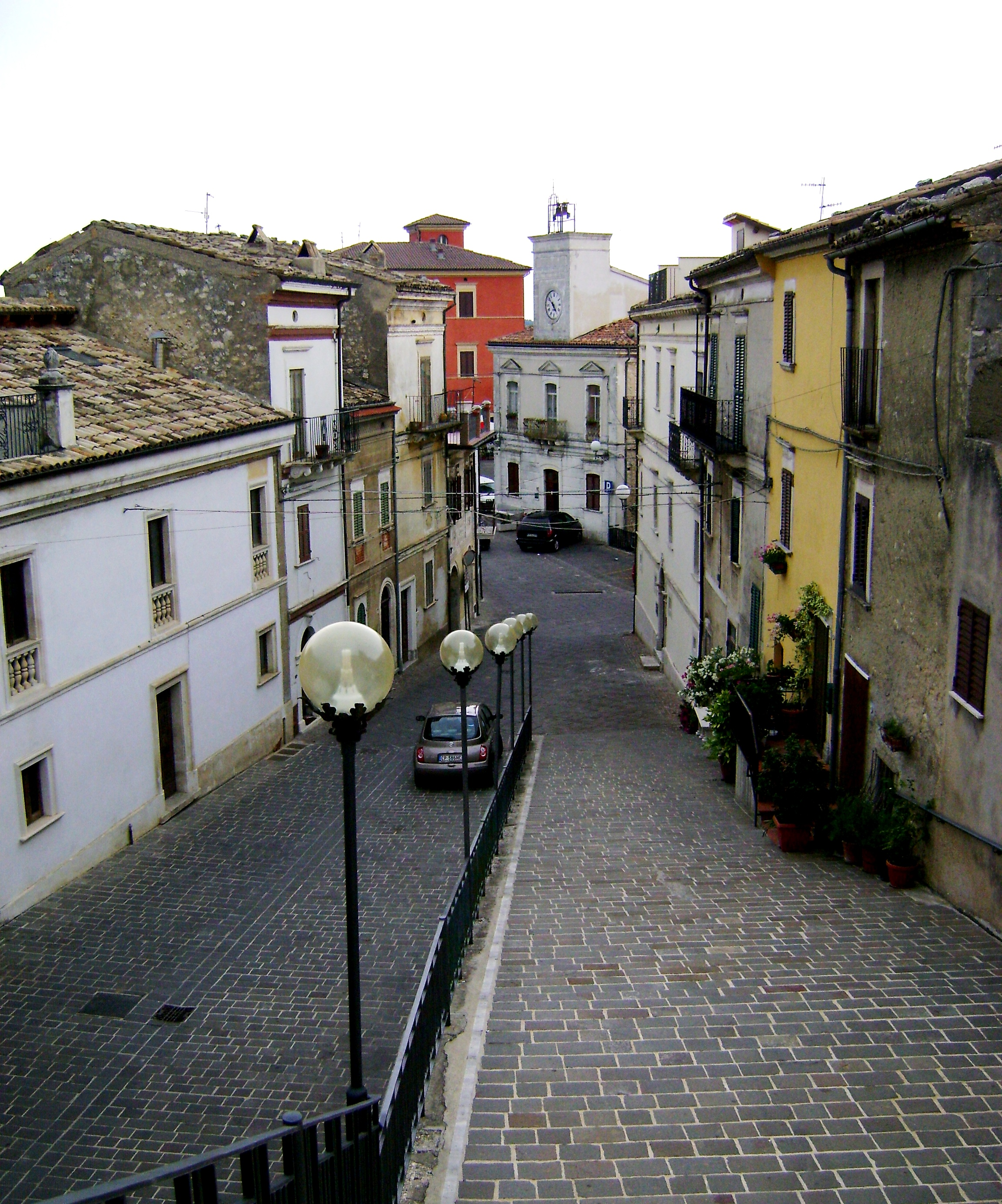 Centro di Rapino, Chieti.